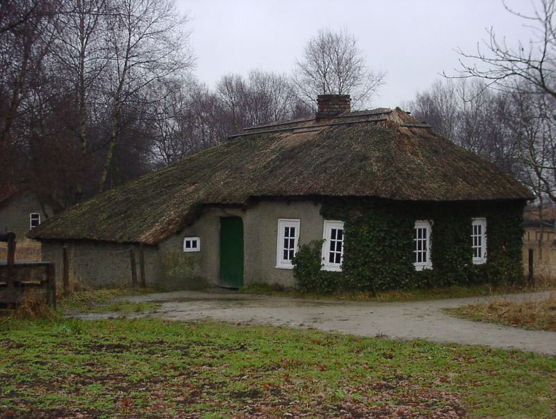 Bild einer reetgedeckten Lehmhütte aus dem Moormuseum Moordorf